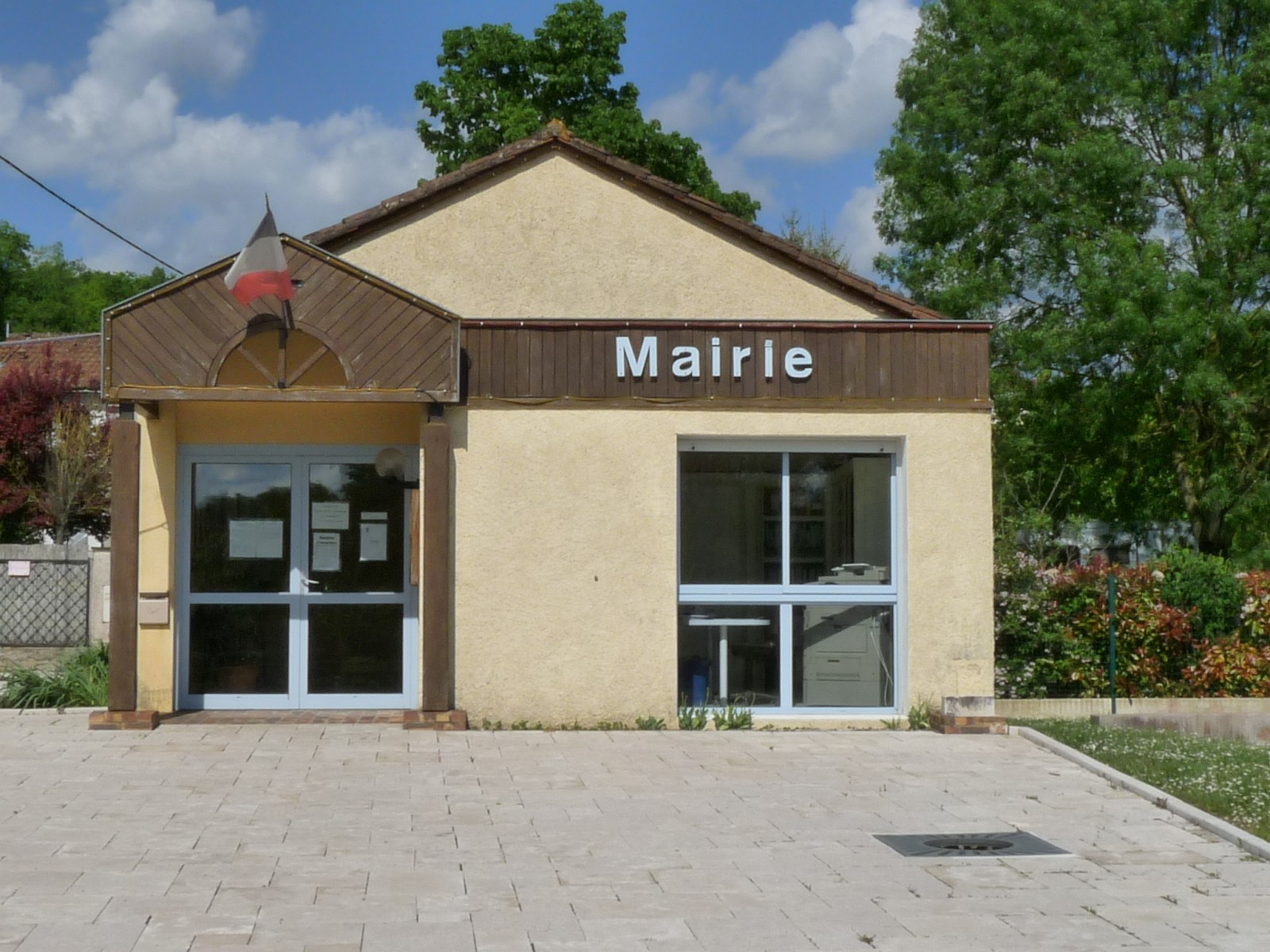 Mairie de Saint-Martin-de-Ribérac, Dordogne, France